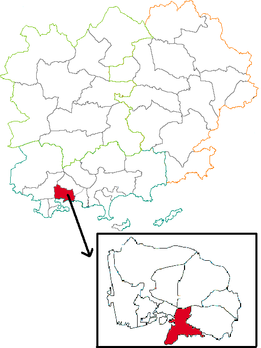 Situation du canton dans le département du Var (83), France